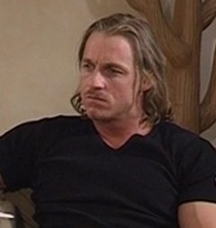 Marc Barrow dans une scène du film "Exhibition 99"